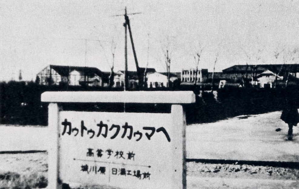 昭和初期 高等学校前駅から旧制富山高校の校舎を望む 旧仮名使いの駅名標示がおもしろい